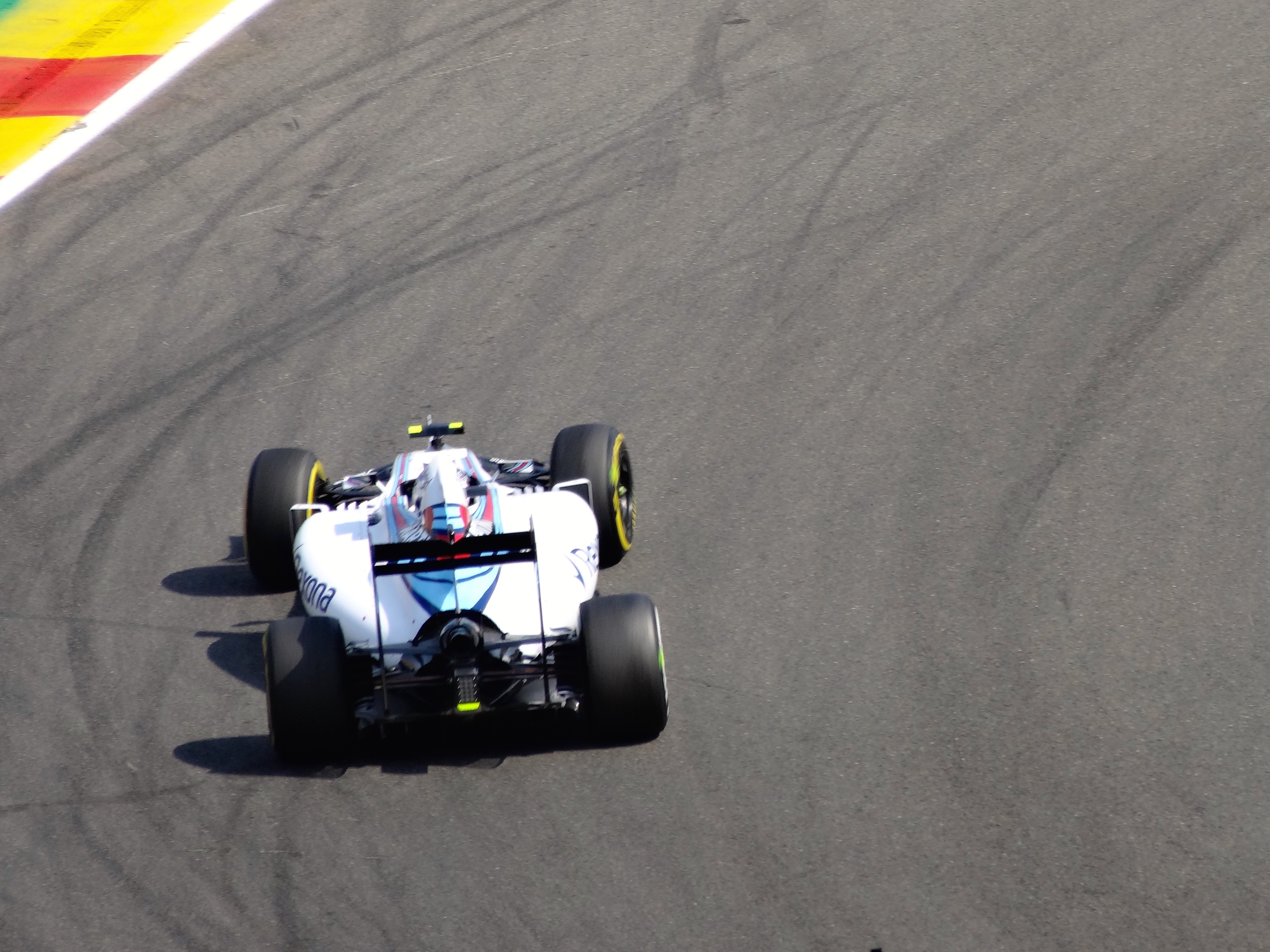 Changement de pneus non conforme pour Bottas à Spa (tendre à l'avant / medium à l'arrière).